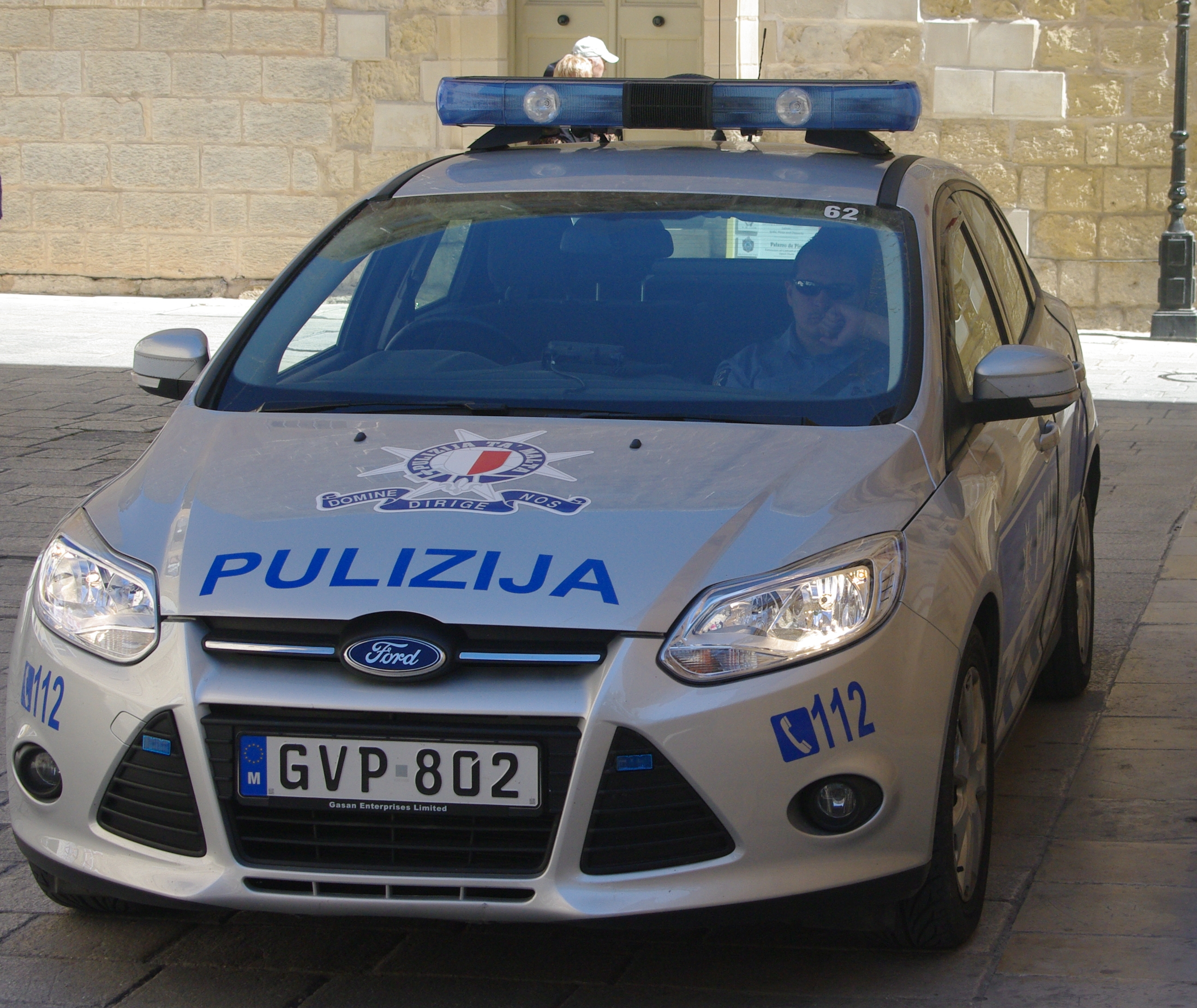 Politieauto in Malta